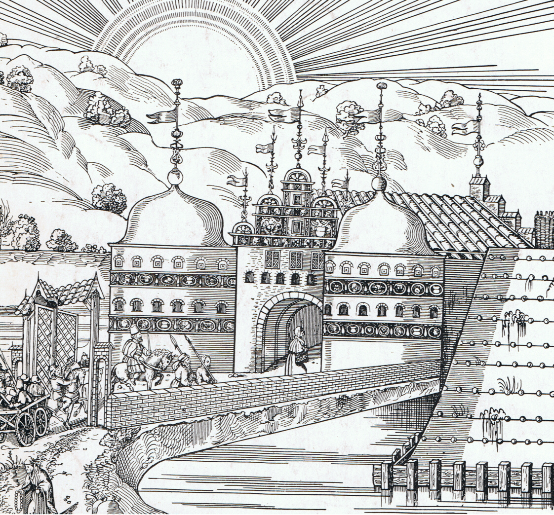 Das äußere Mühlentor in Lübeck, dargestellt auf der Lübecker Stadtansicht des Elias Diebel, 1552